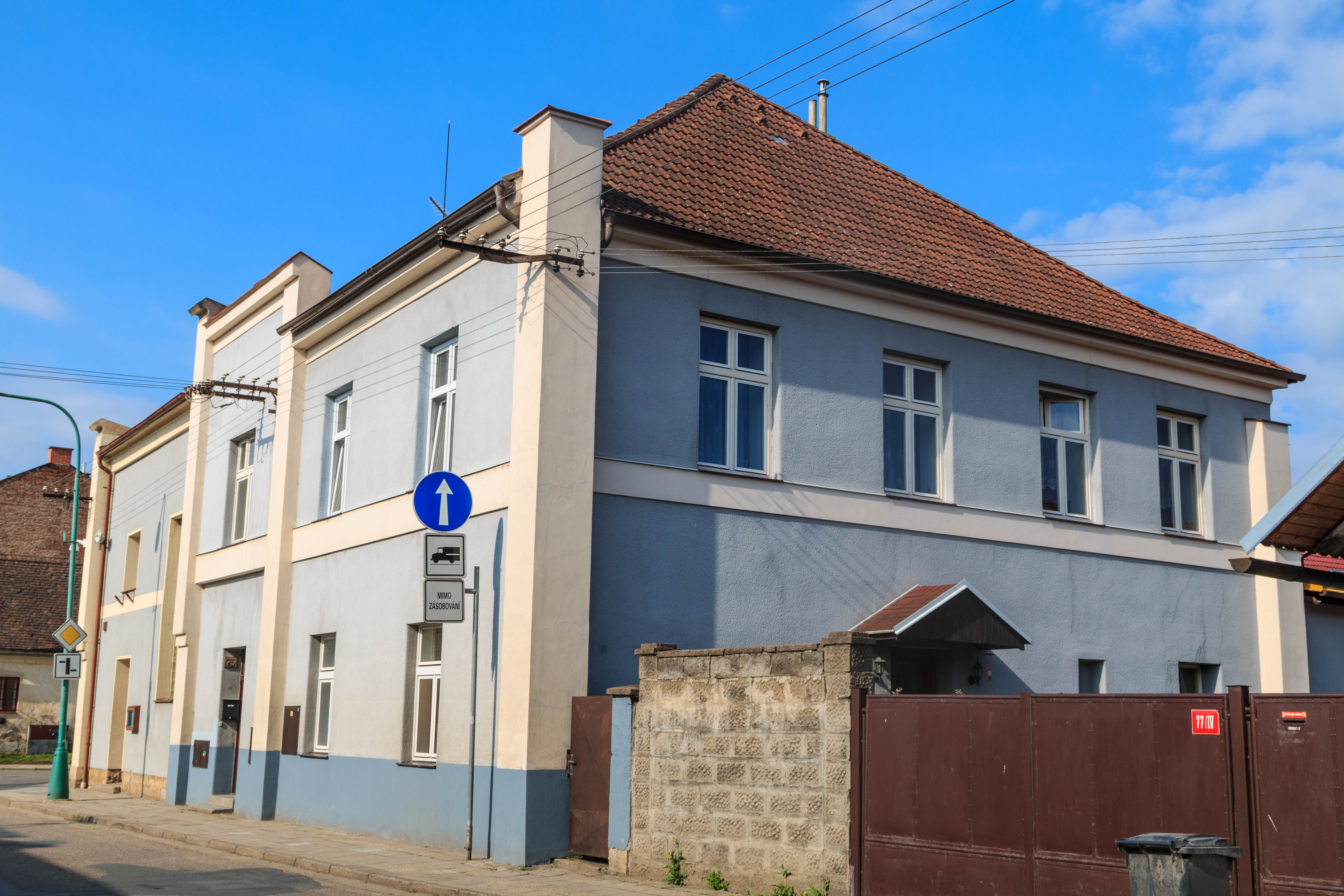 Bývalá synagoga v Chlumci nad Cidlinou Project: Židovské památky